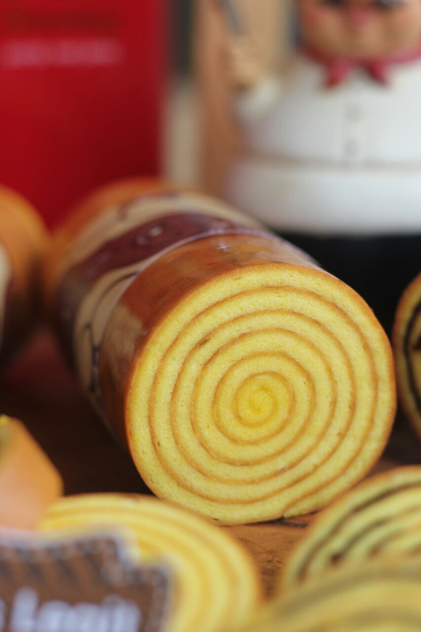 Legit gulung yang memiliki hasil gulungan dengan warna kontras.